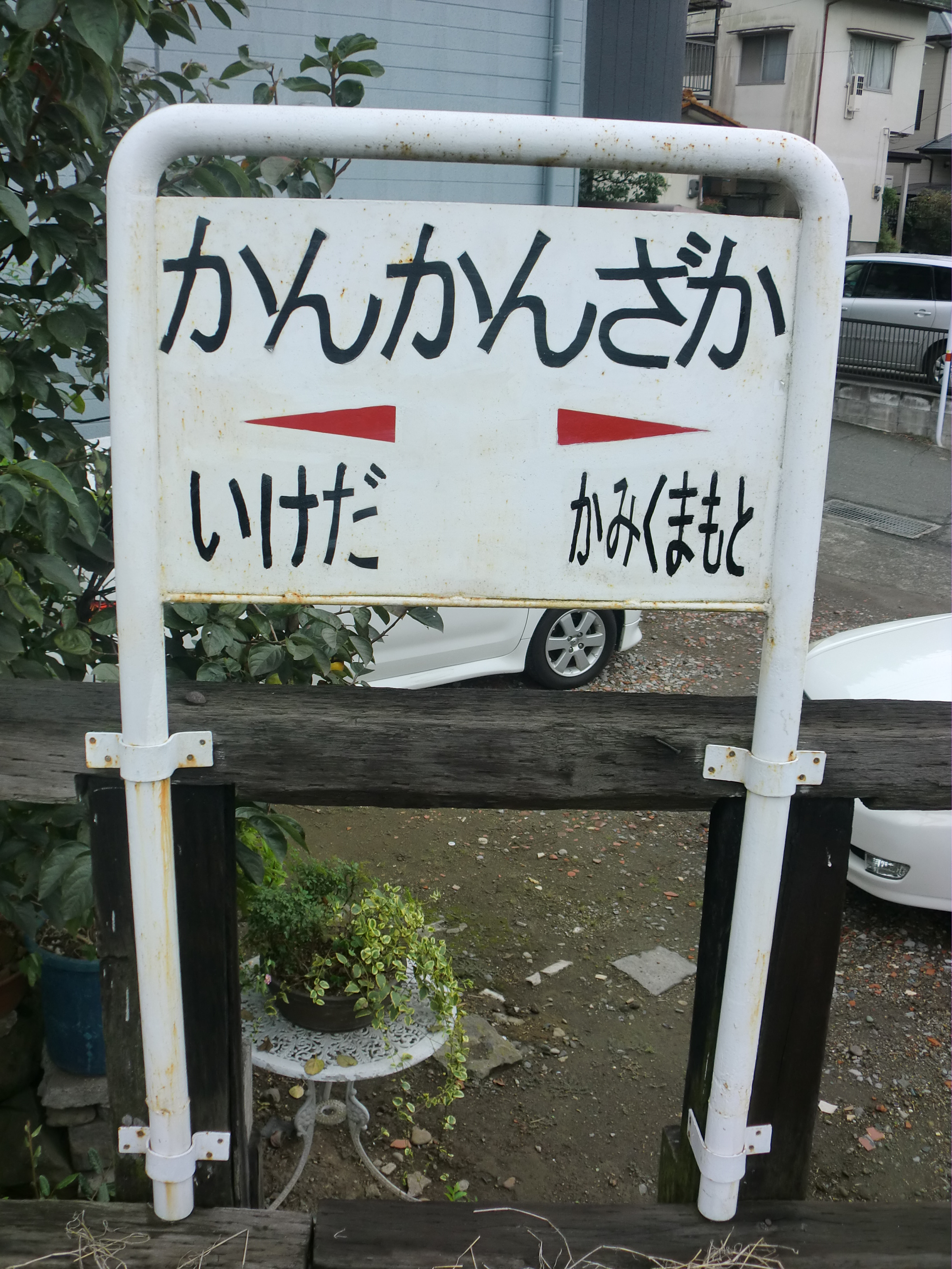 熊本電鉄韓々坂（かんかんざか）駅駅名標